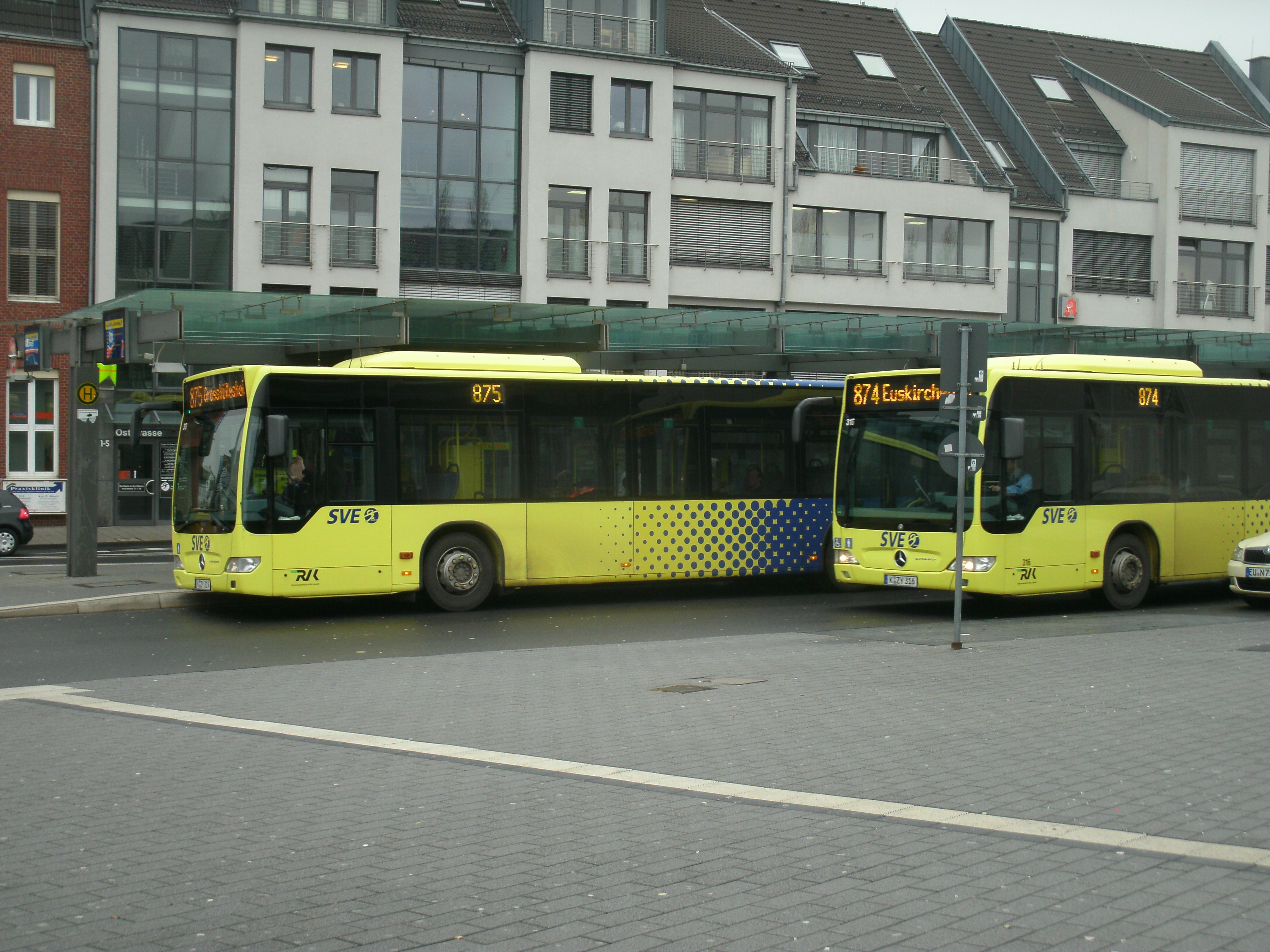 Linienbusse der RVK (Regionalverkehr Köln) im Einsatz für die SVE (Stadtverkehr Euskirchen) am Busbahnhof vor dem Euskirchener Bahnhof